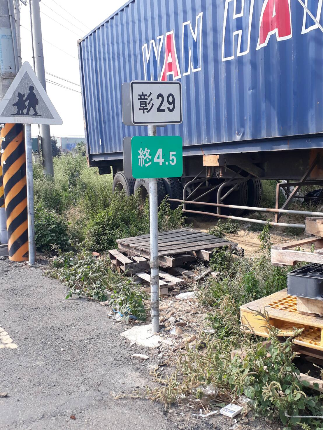 鄉道 彰29線終點牌面 終點(4.5k牌面)，福興鄉鎮平村拍攝